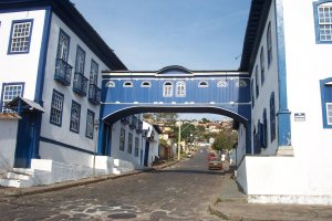 Diamantina.